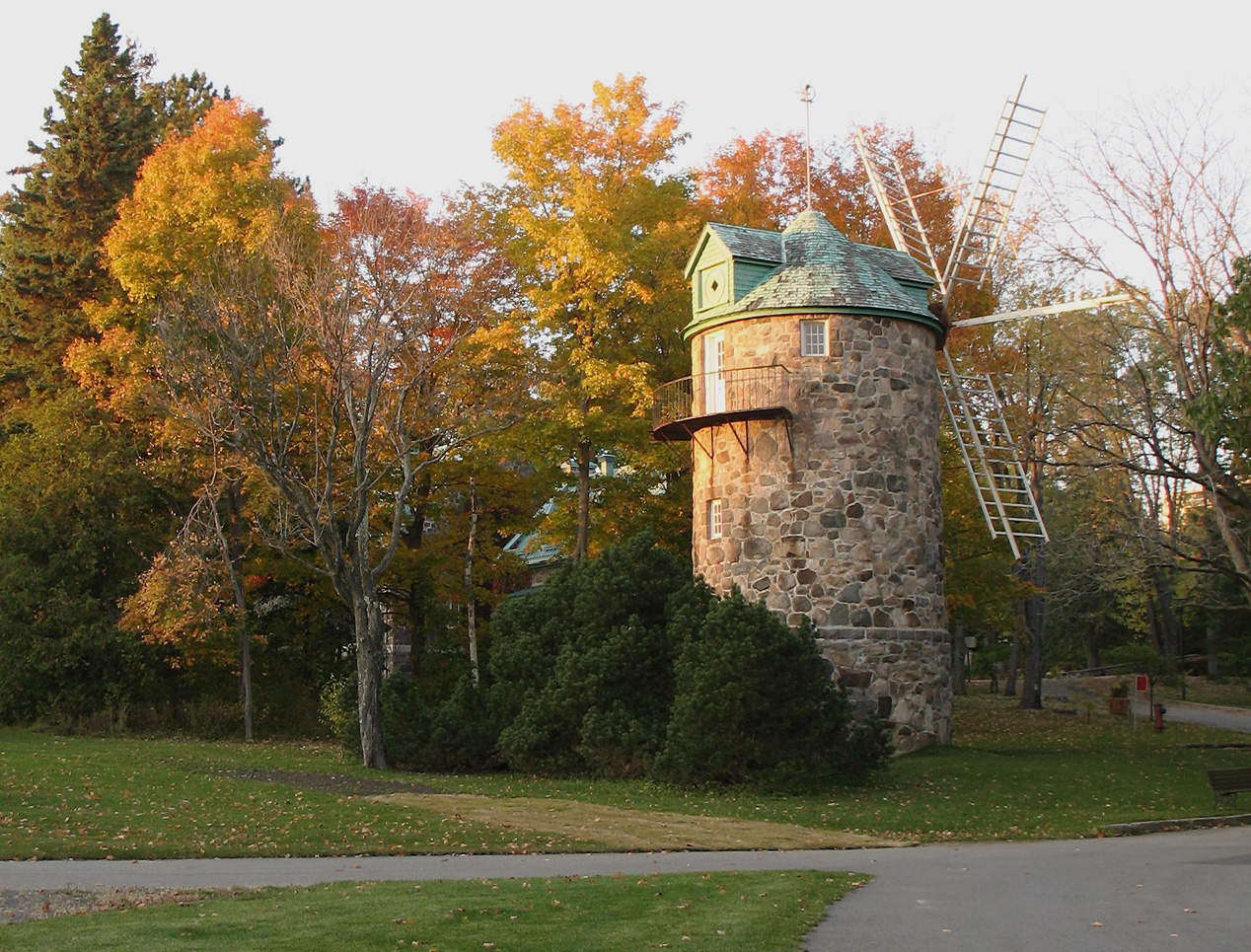 Parc des Moulins (ancien jardin zoologique), arrondissement de Charlesbourg, Ville de Québec, Québec, Canada. Ce moulin à vent a été construit en 1932 mais n'a jamais été utilisé comme tel. À l'origne, le jardin zoologique voulait reconstituer un village québécois avec son traditionnel moulin à vent. Dans ce même parc, où passe la rivière du Berger, on trouvait aussi des moulins à eau, d'où le nom du parc.